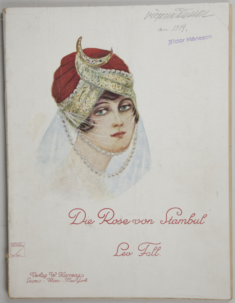 Titelblatt des Klavierauszugs der Operette "Die Rose von Stambul" von Leo Fall